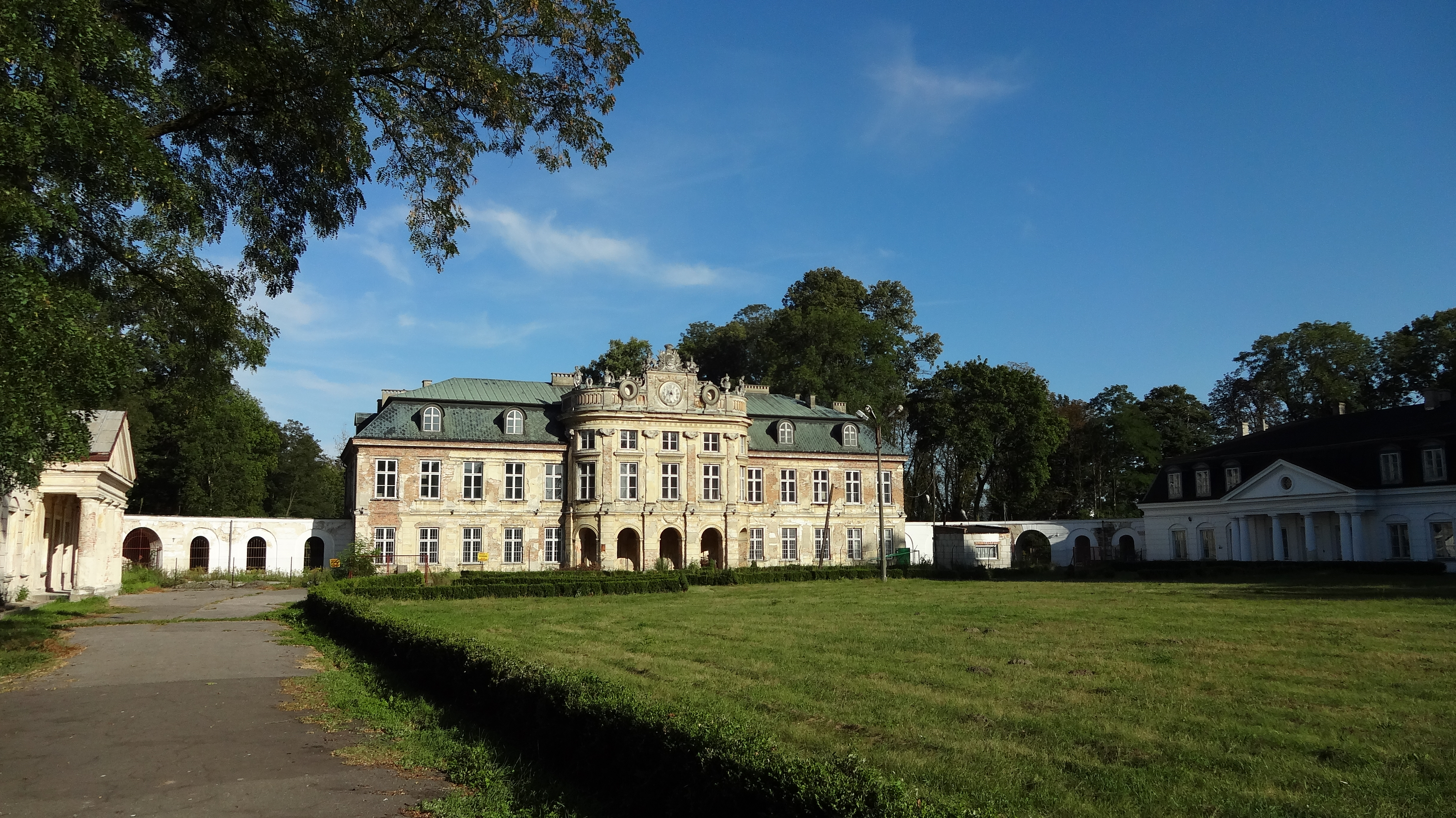 Barokowo-klasycystyczny zespół pałacowy Dembińskich